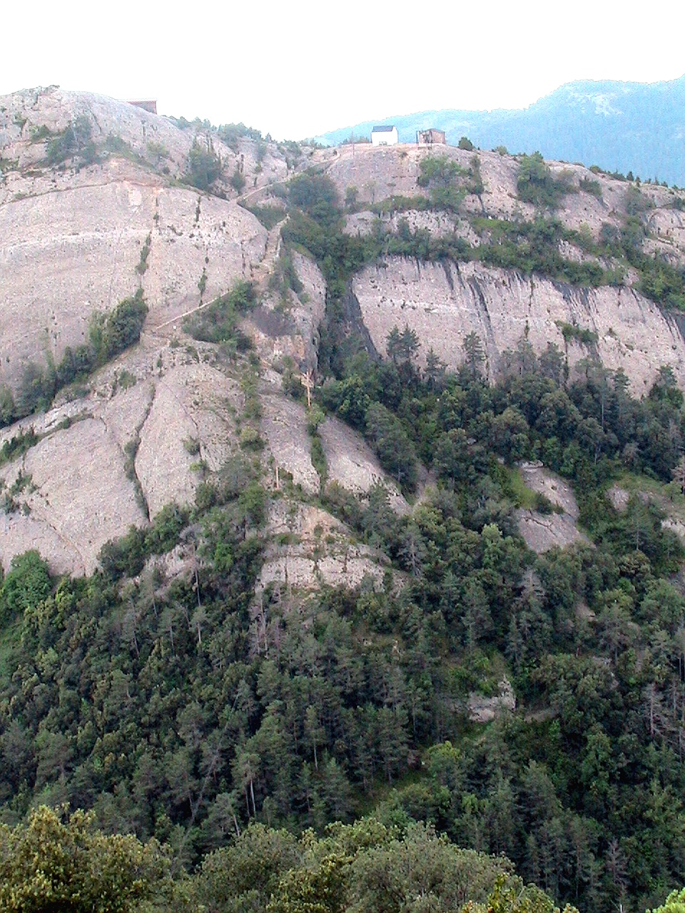 El Grau de Lord vist des del Tossal de Vall-llonga